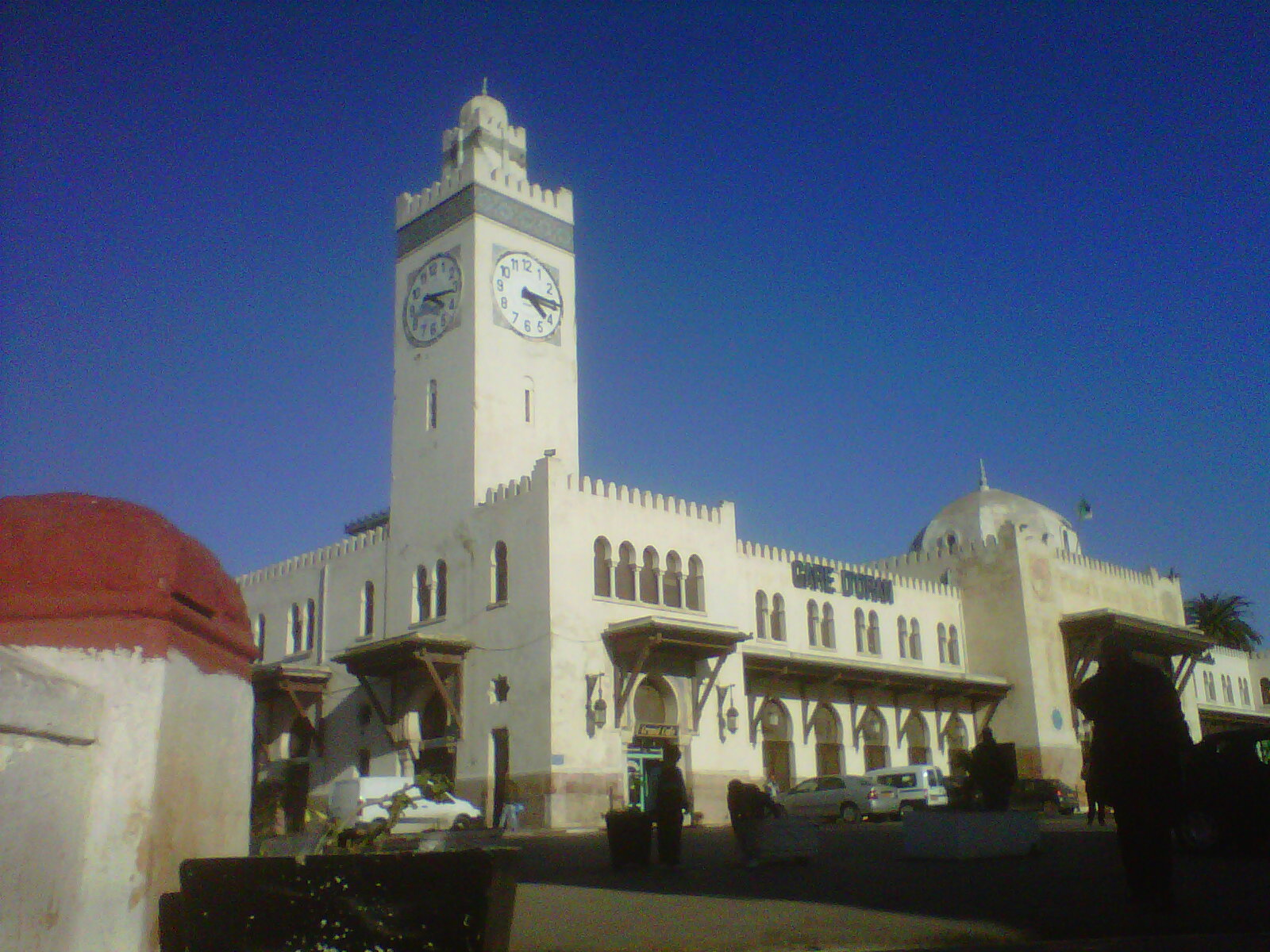 Gare ferroviaire d'Oran Algérie